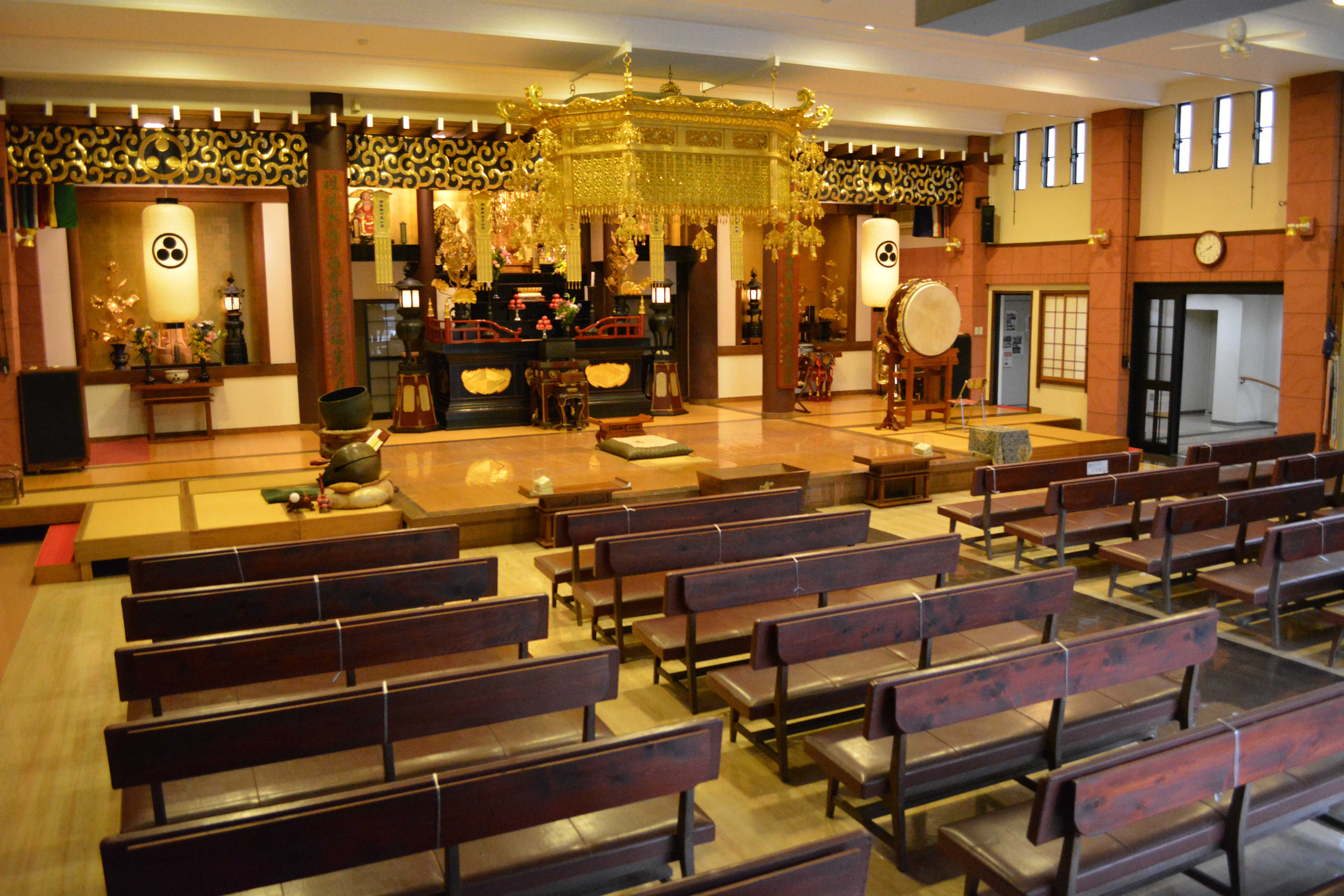 長崎県佐世保市にある西方寺の本堂です。